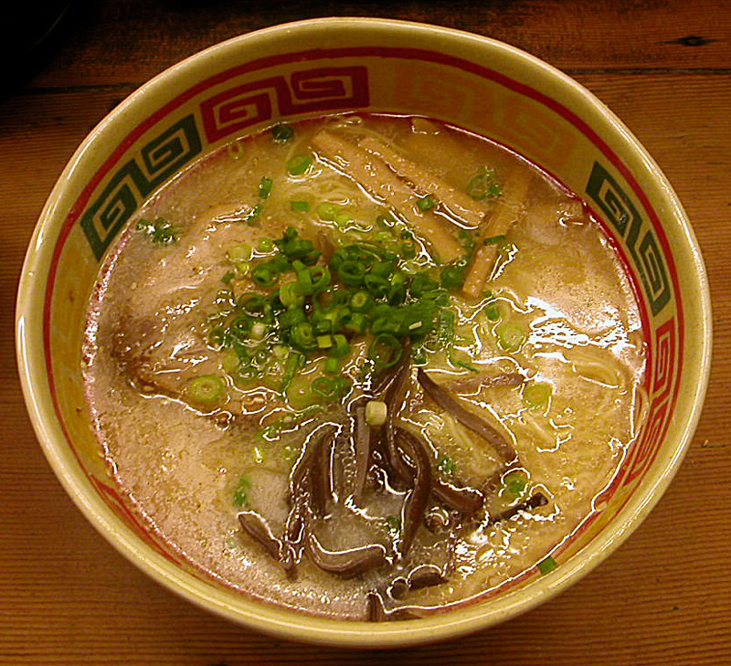 撮影者：小太刀 九州じゃんがらラーメン